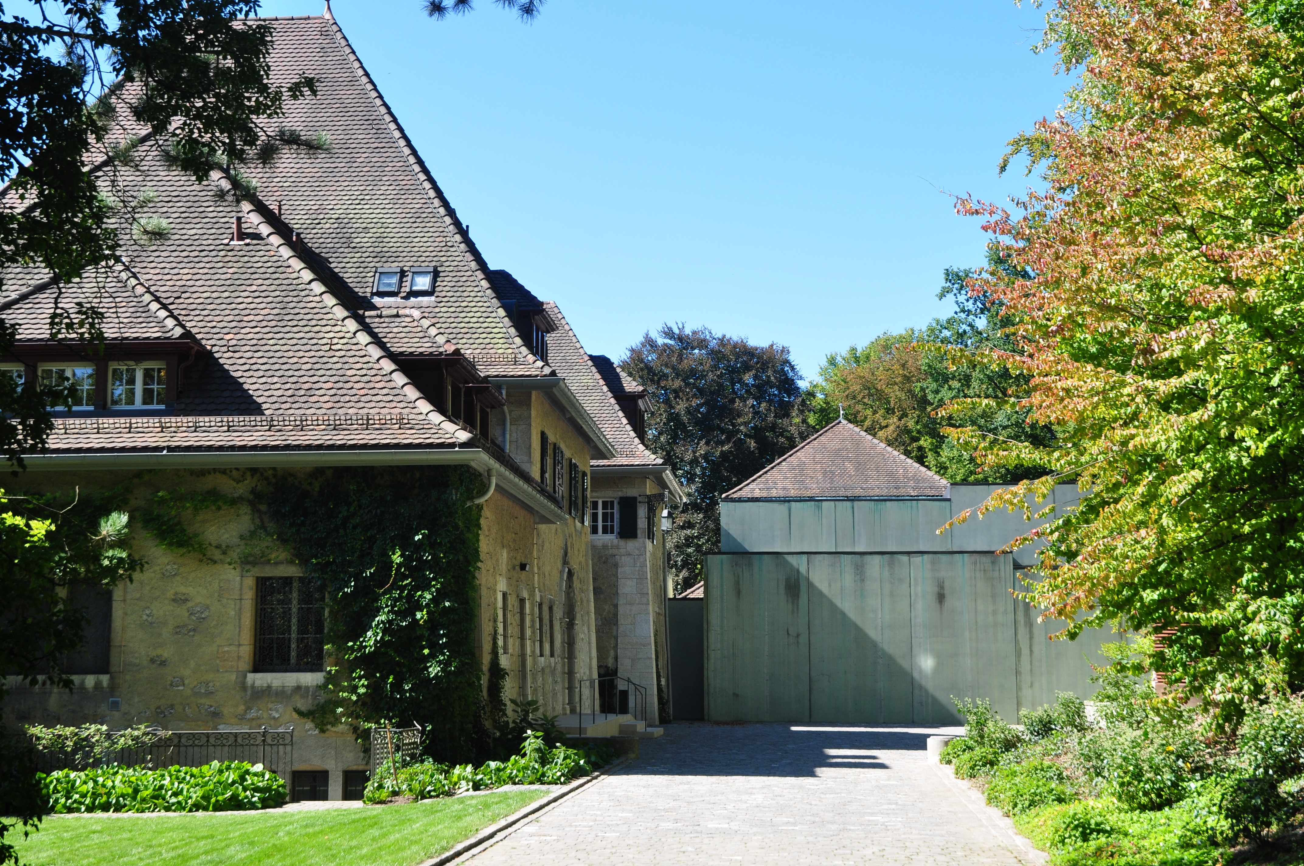 Villa Am Römerholz (ehemalige Villa Henri Sulzer-Ziegler) und Sammlung Oskar Reinhart «Am Römerholz», Haldenstrasse 95 in Winterthur (Switzerland)